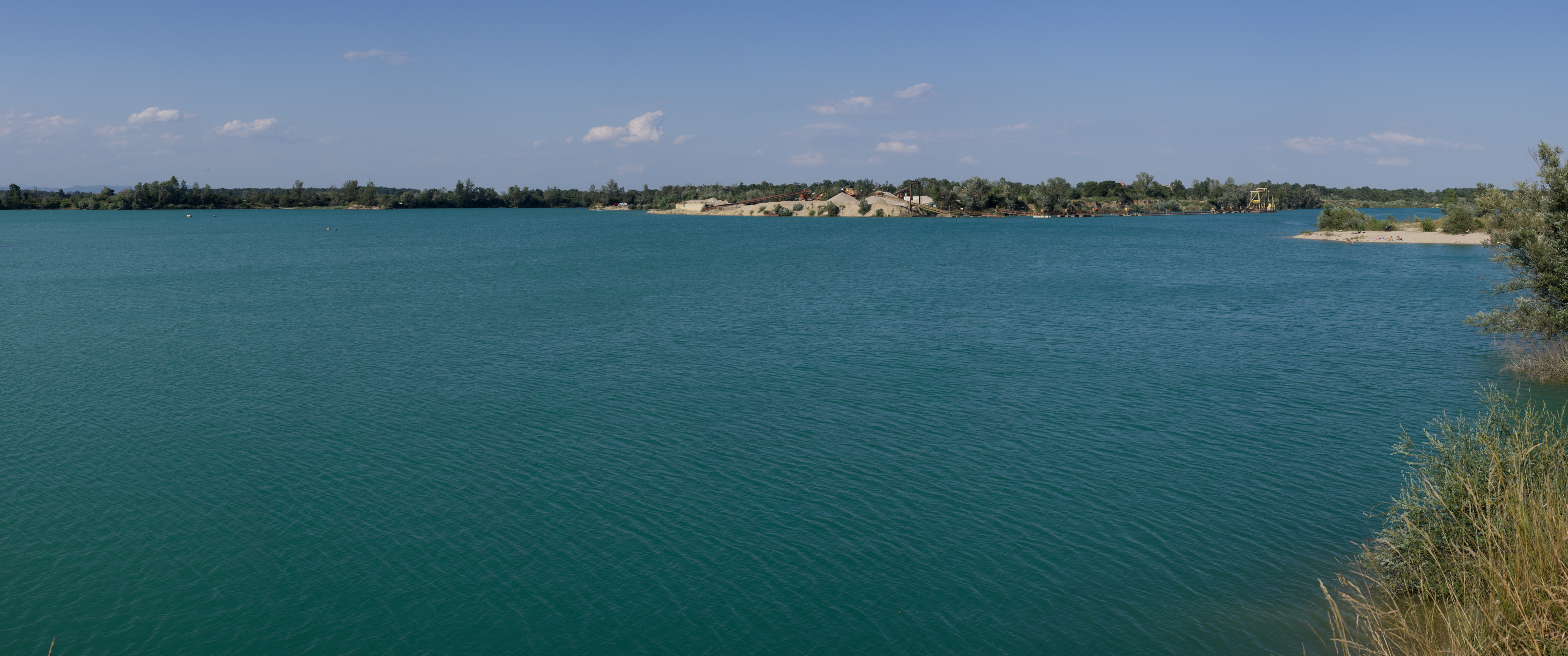 Jezero Čiče između Velike Gorice i Novog Čiča